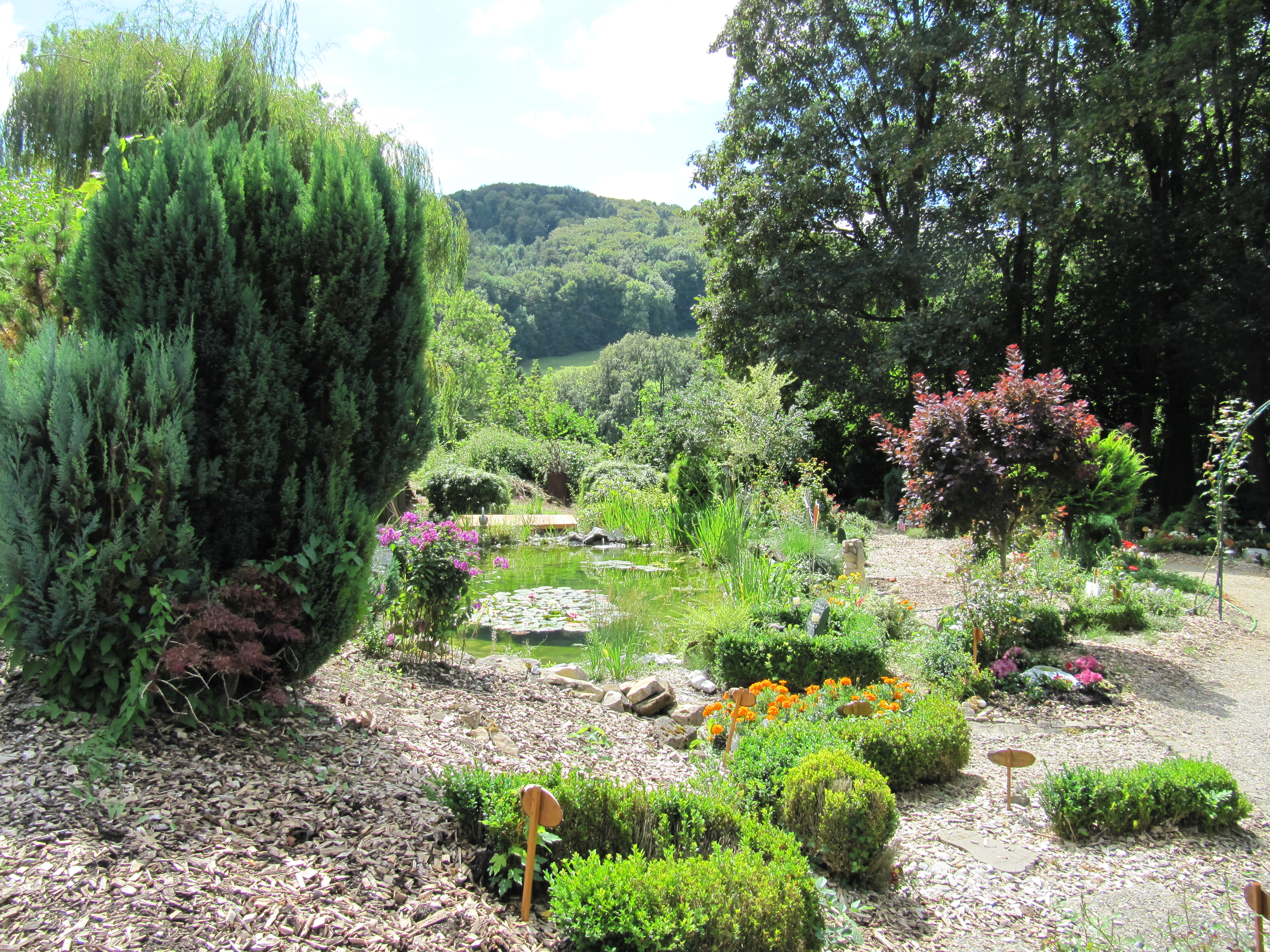 Tierfriedhof am Wisenberg, Läufelfingen BL, erster Tierfriedhof der Schweiz (2001 gegründet), Blick auf Grabfeld und Teich